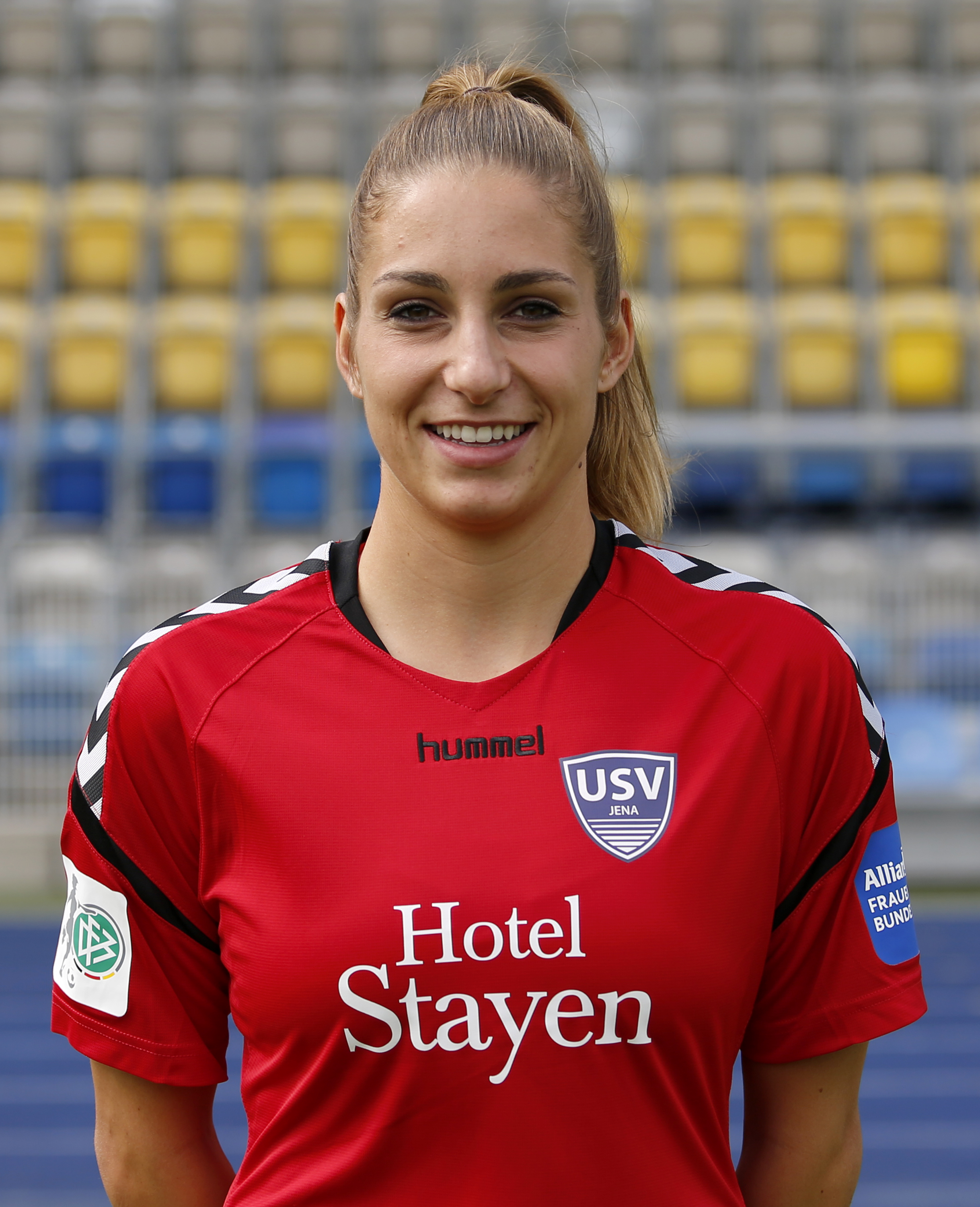 Antonia Knupfer